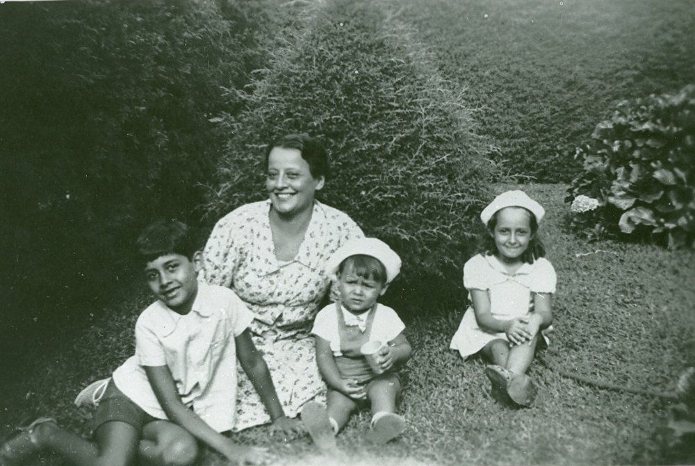 Nayde Cardoso e filhos (c.1937).